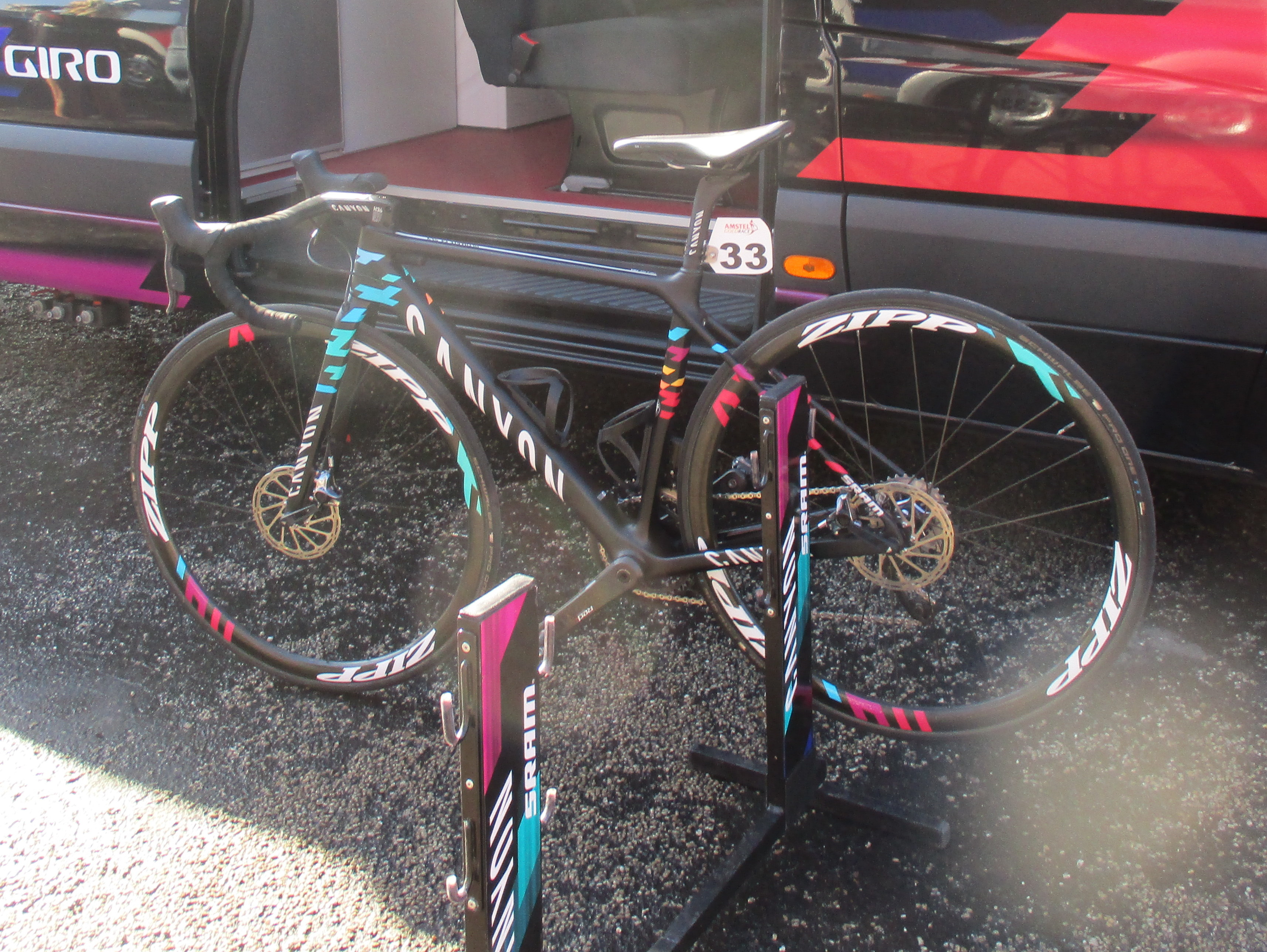 Start van de Amstel Gold Race Ladies Edition 2018 in Maastricht.